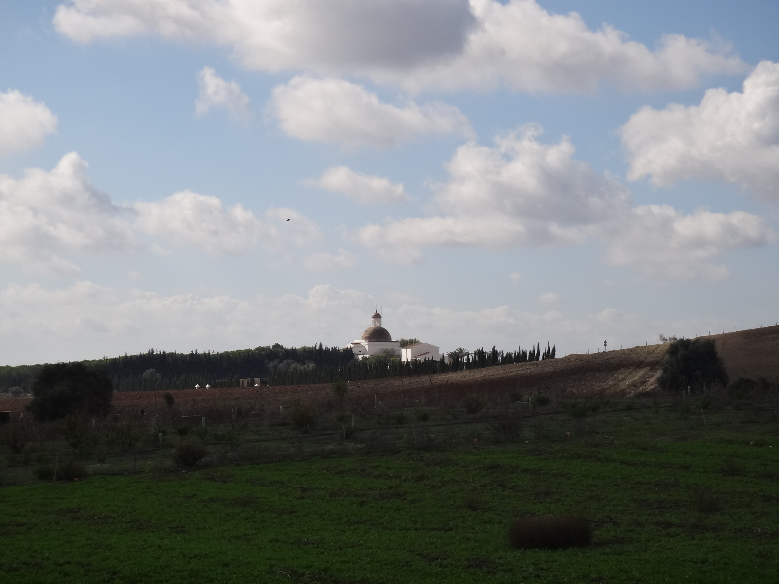 Ermita de Salto al Cielo desde CA-31111 entrada a Rancho Cortesano. Jerez de la Frontera (Andalucía, España)